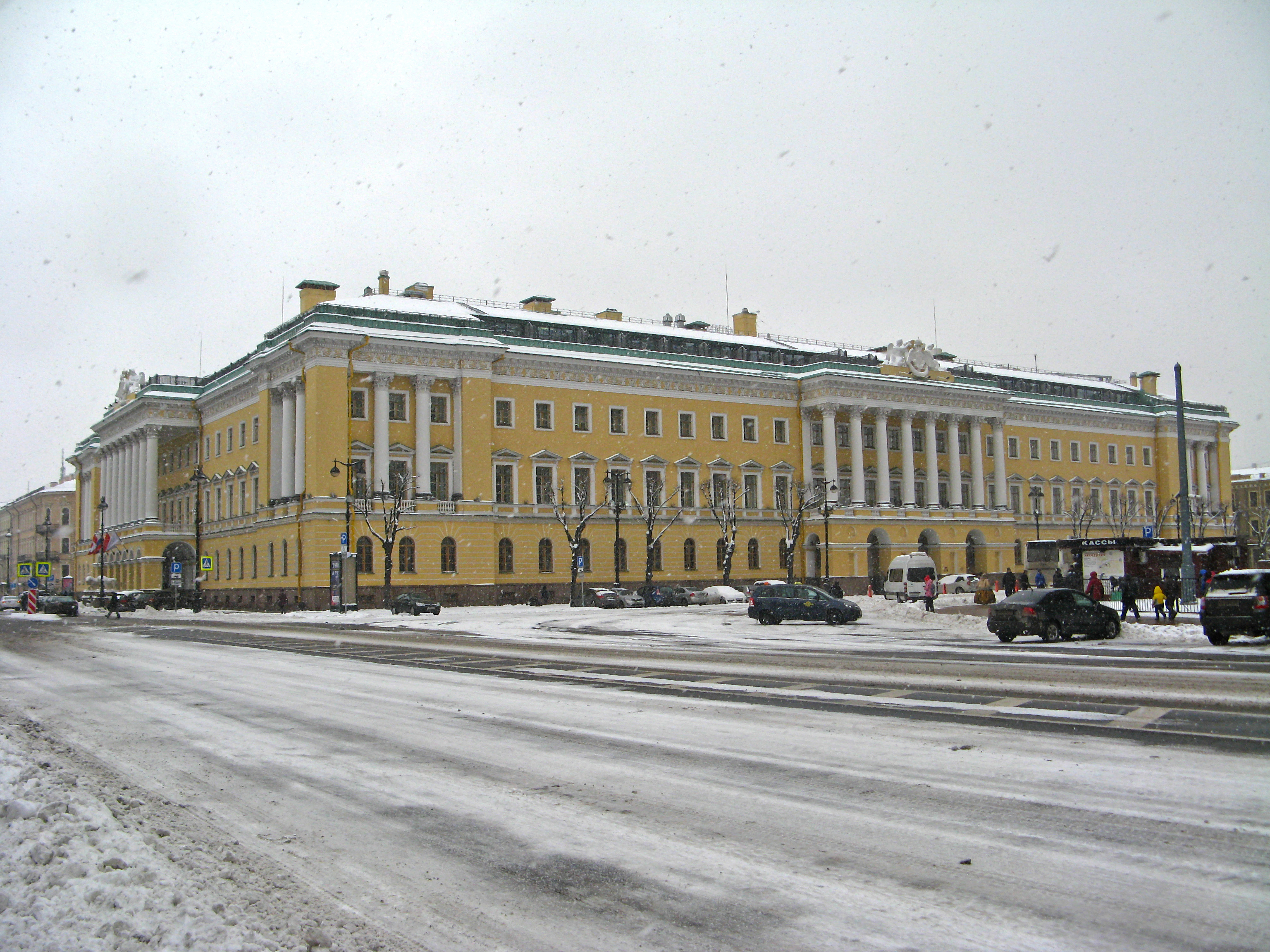 Дом А.Я. Лобанова-Ростовского: Исаакиевская площадь, 2, Адмиралтейский проспект, 12, Вознесенский проспект, 1, Адмиралтейский район, Санкт-Петербург